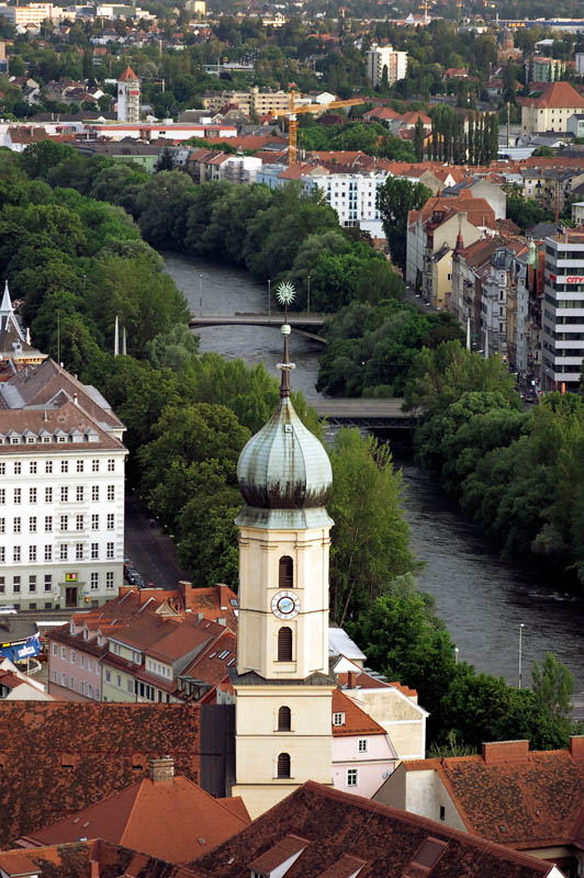 Franziskanerkirche in Graz